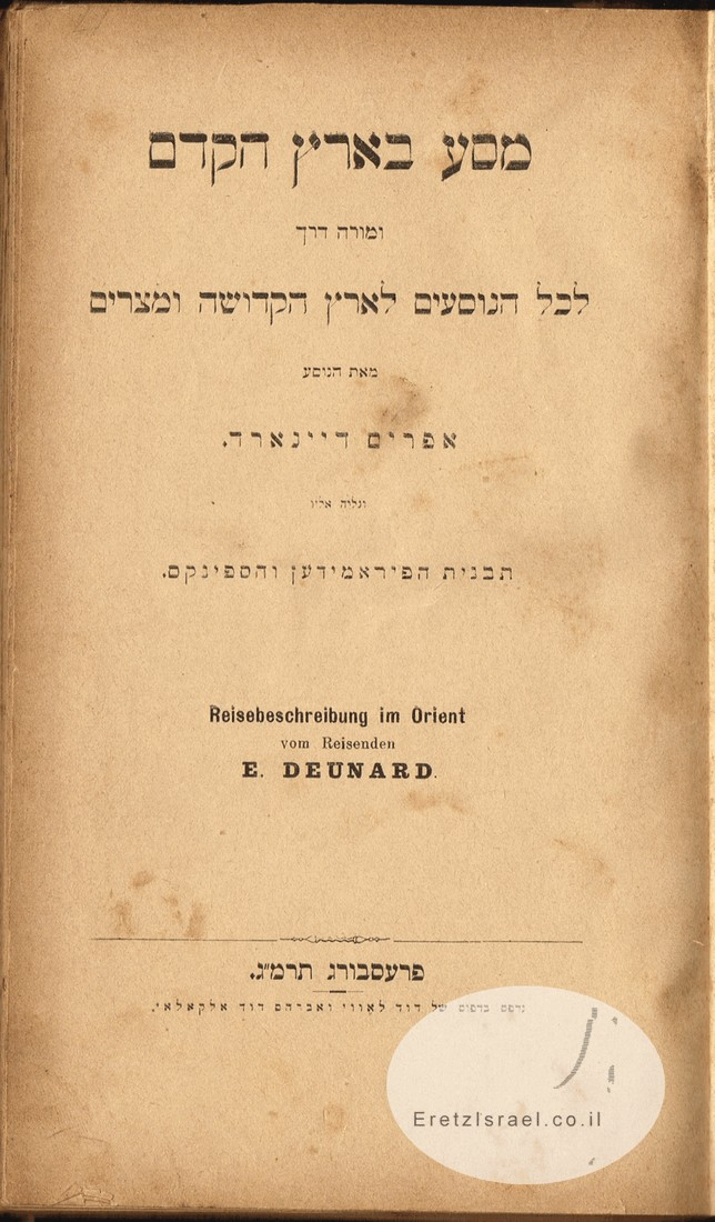 מסע בארץ הקדם ומורה דרך לכל הנוסעים לארץ הקדושה ומצרים - עמוד השער. מאתר